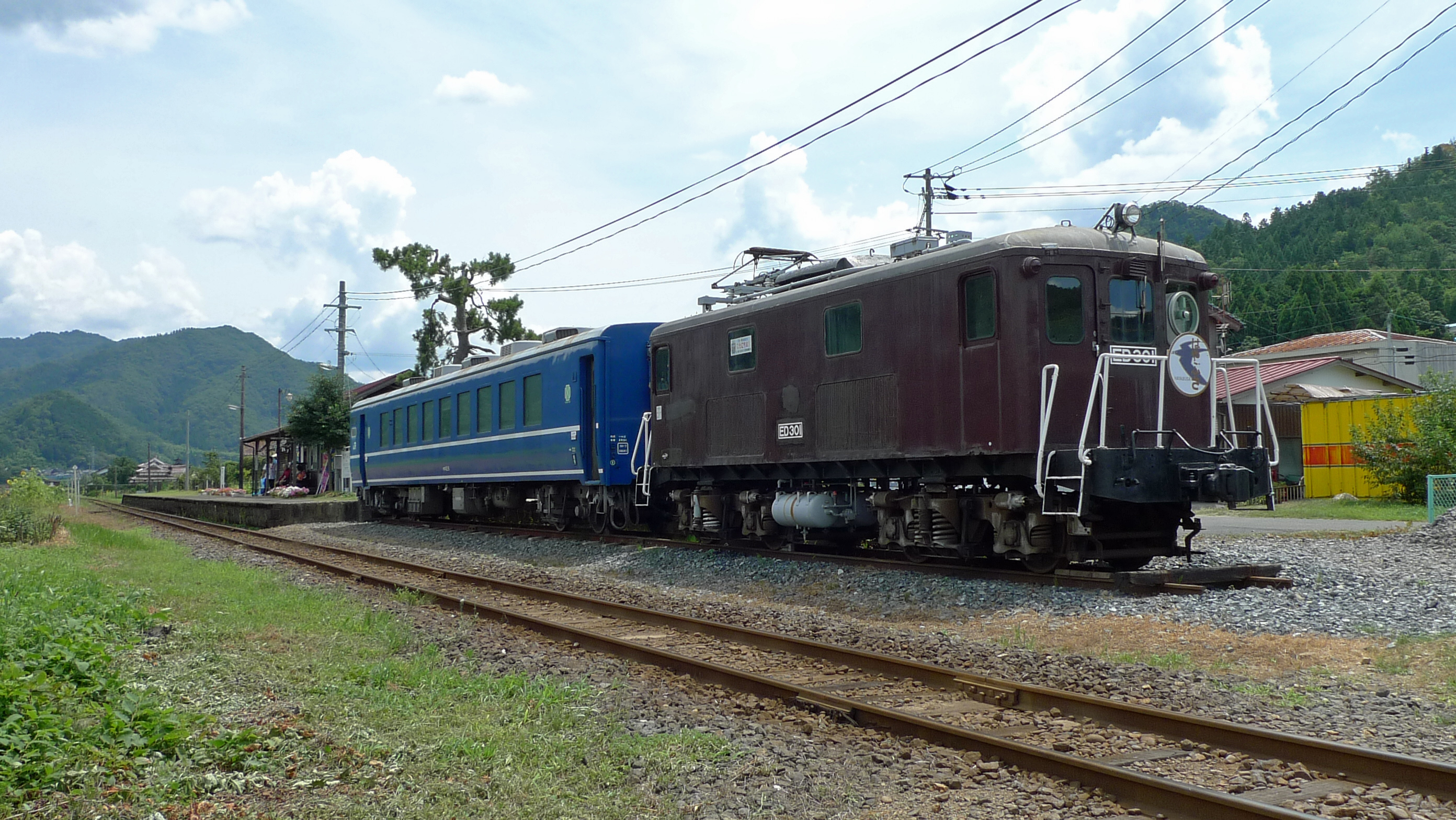 隼駅に留置されている北陸鉄道ED30&オロ12 6とホーム